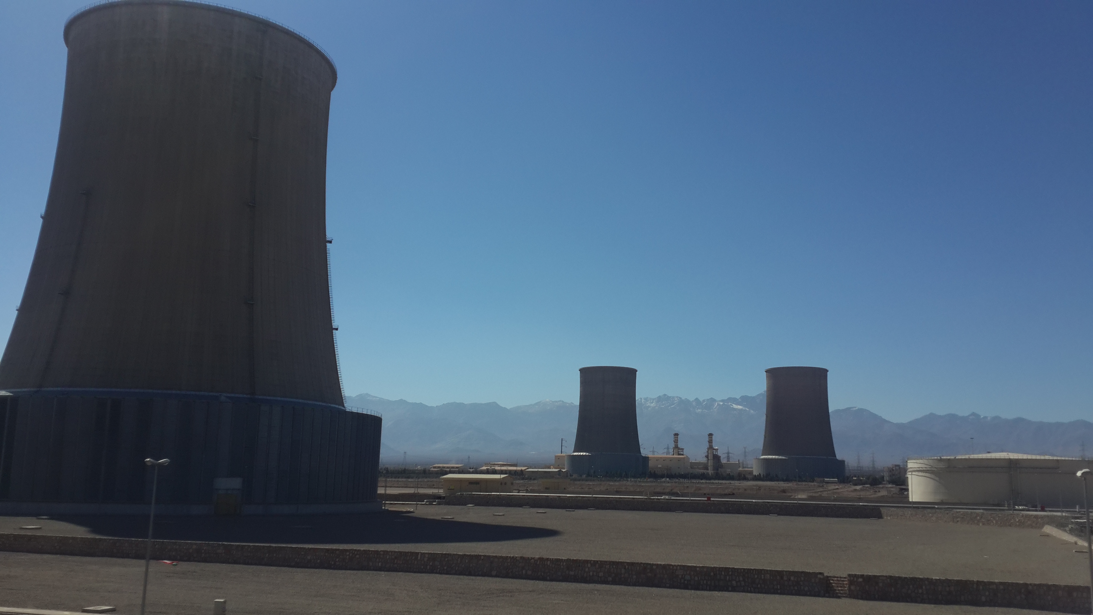 برجهای خنک کننده نیروگاه سیکل ترکیبی شیرکوه یزد